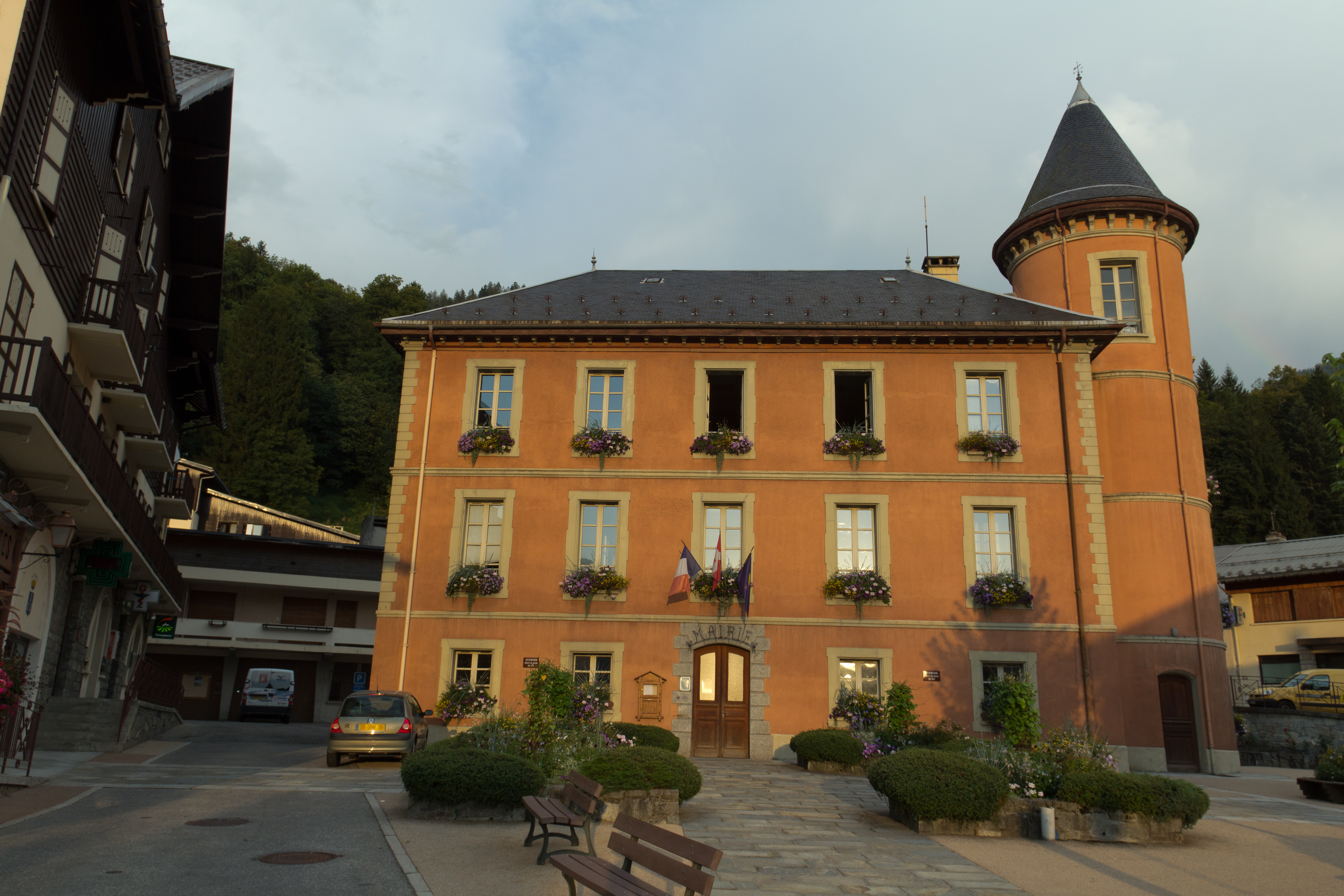 Mairie de Beaufort-sur-Doron en Savoie, au crépuscule.